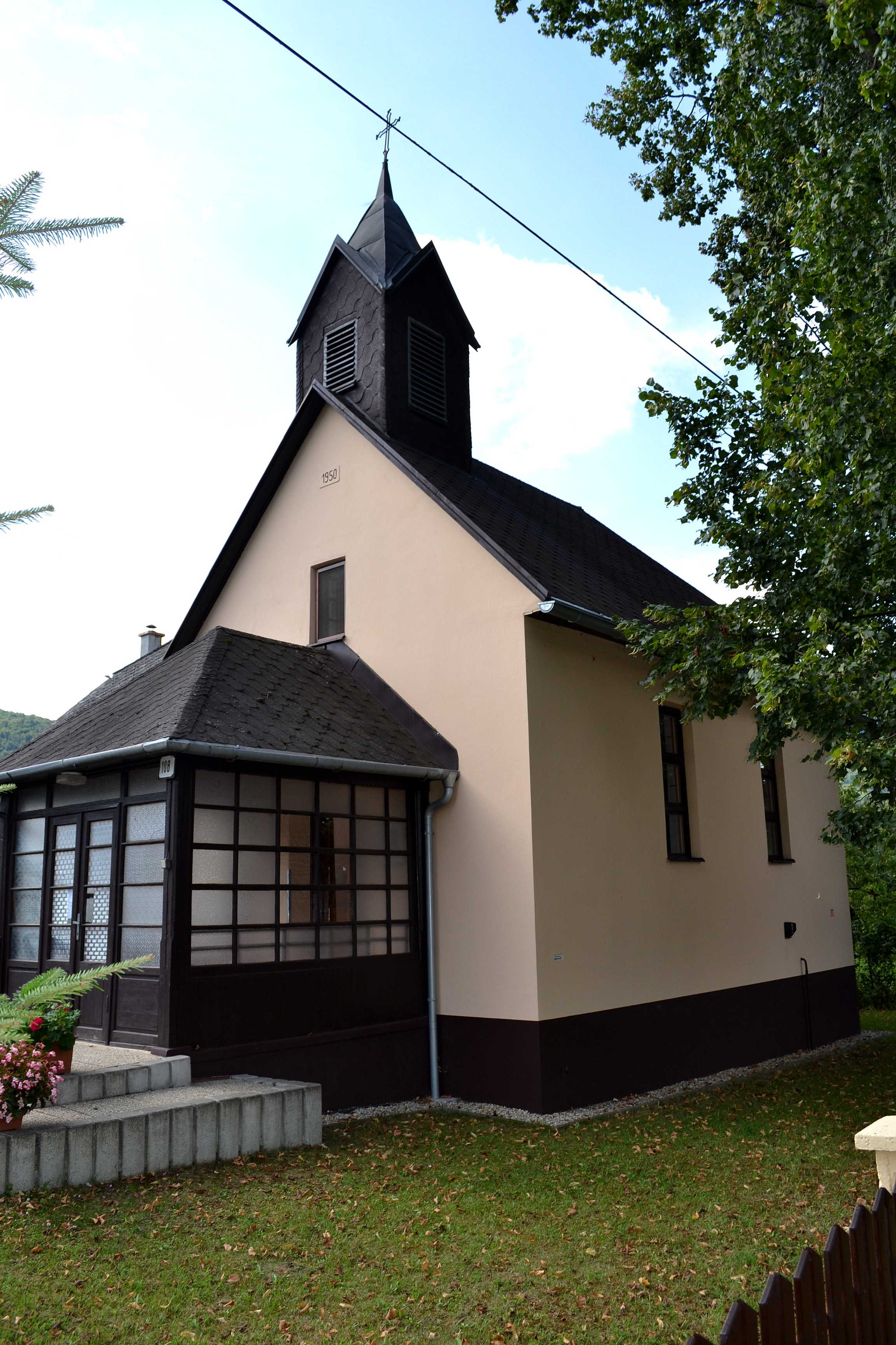 Dolný Lieskov (okr. Považská Bystrica), kaplnka z roku 1950 v miestnej časti Tŕstie